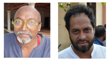 കൊച്ചി-മുസിരിസ് ബിനാലെ 2012 ക്യൂറേറ്റർമാർ ബോസ് കൃഷ്ണമചാരിയും റിയാസ് കോമുവും